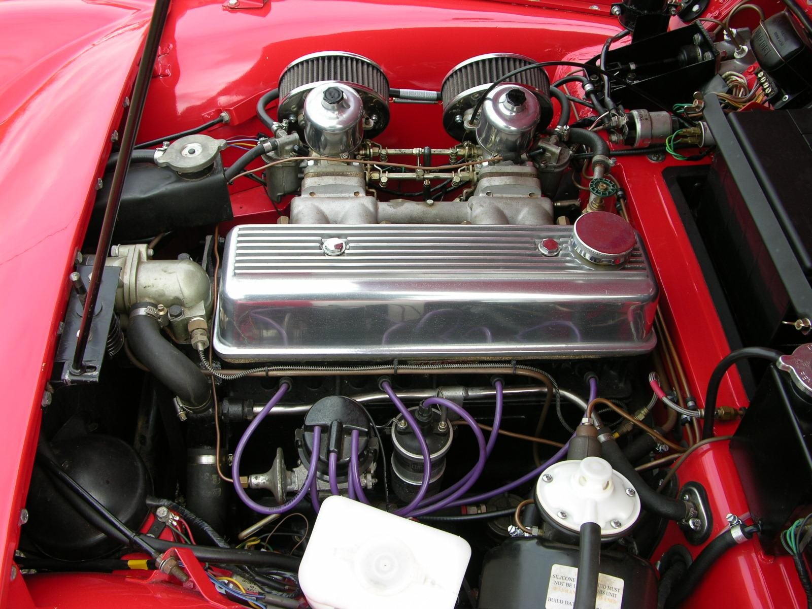 1961 Triumph TR3A